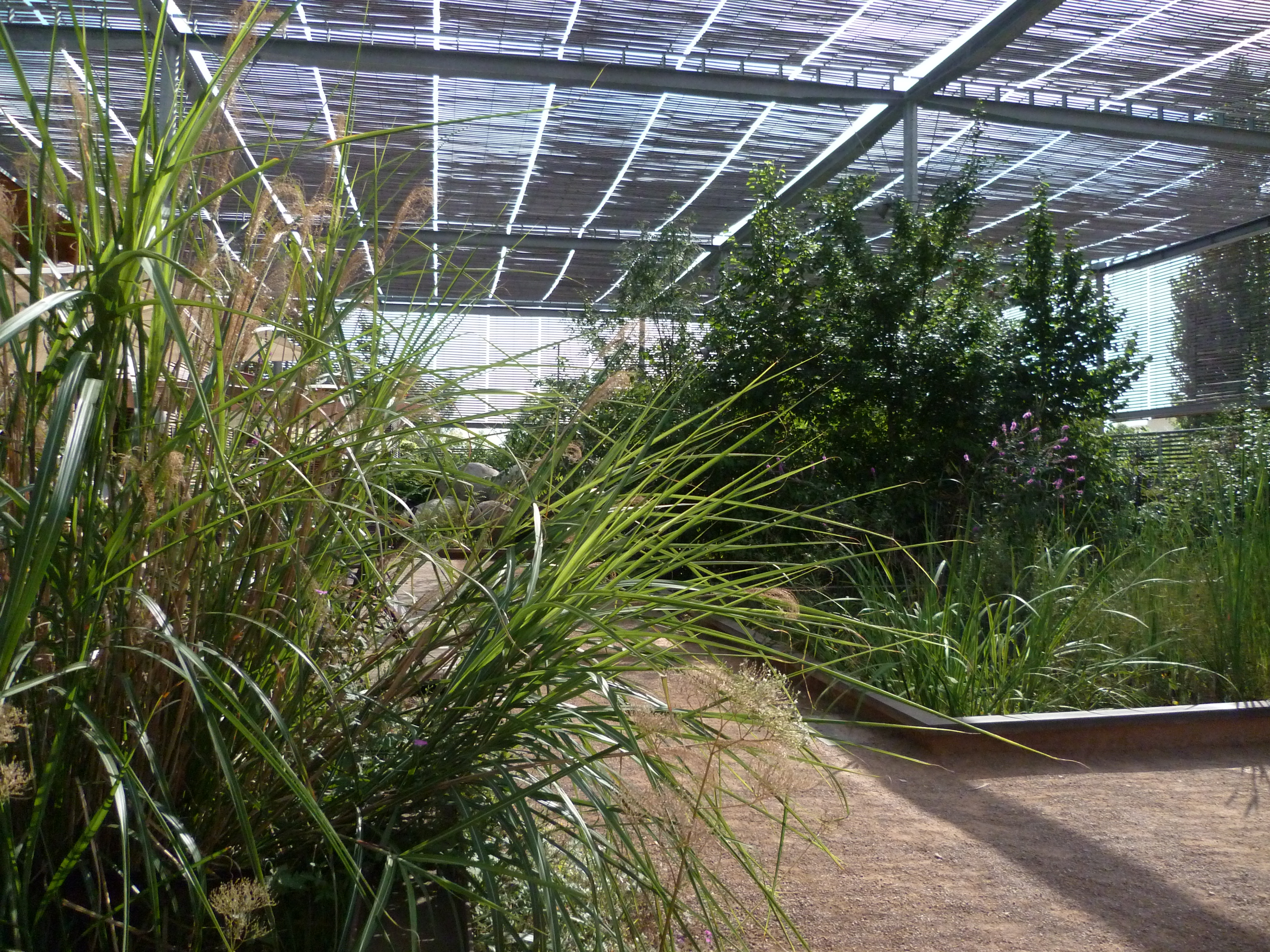 Toulouse (Haute-Garonne, France) : Sous l'ombrière des Jardins du Muséum.